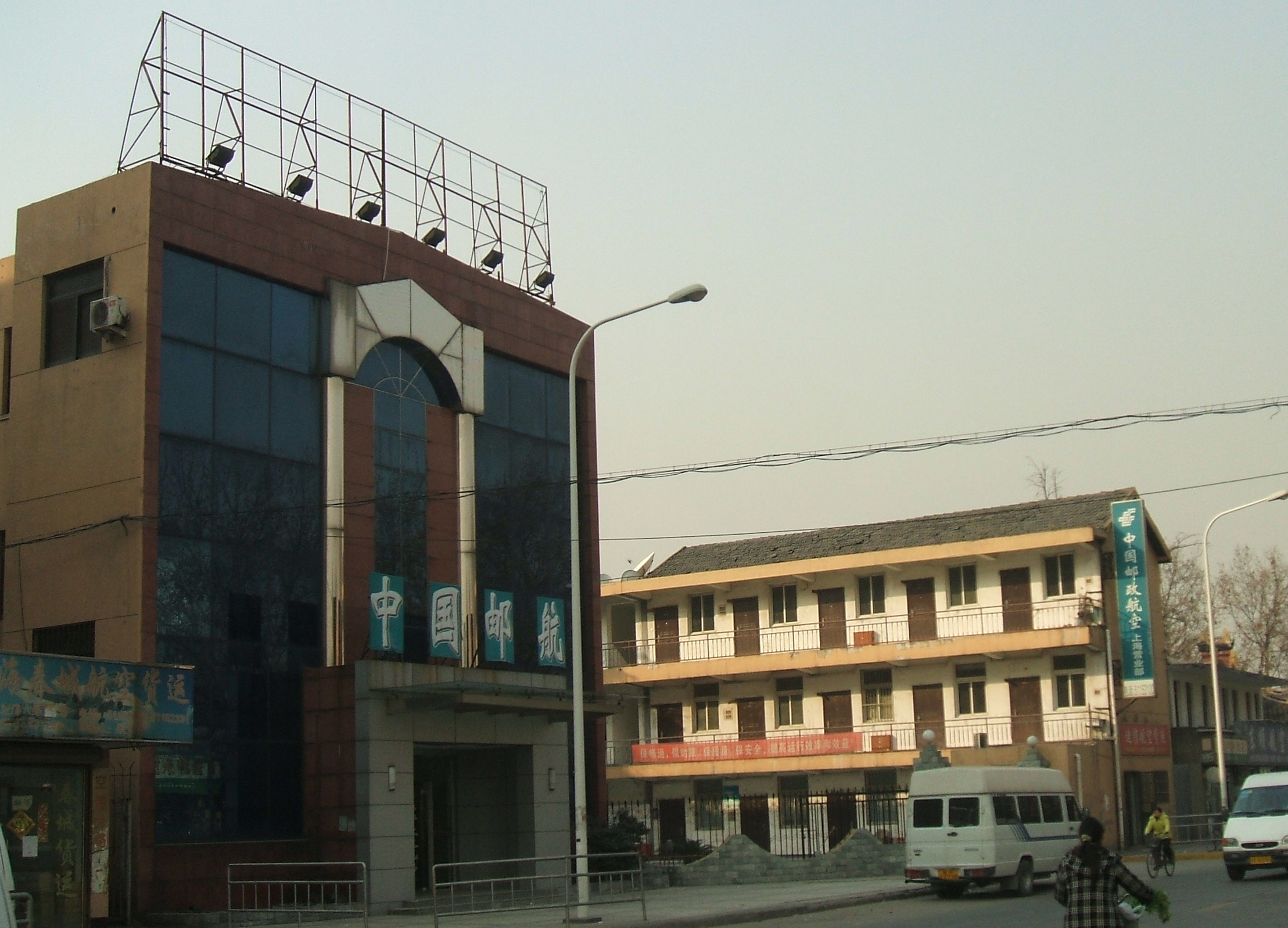 China Postal Airlines 上海営業所の外観（上海紅橋空港近隣地）